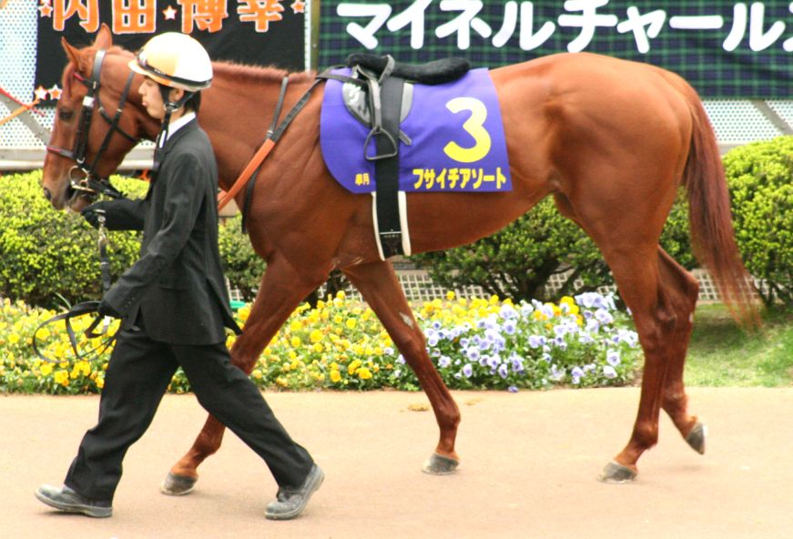 フサイチアソート（中山競馬場 第68回皐月賞）